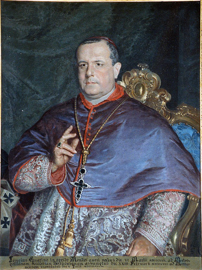 Bottega siciliana sec. XIX, Ritratto del Vescovo Guarino